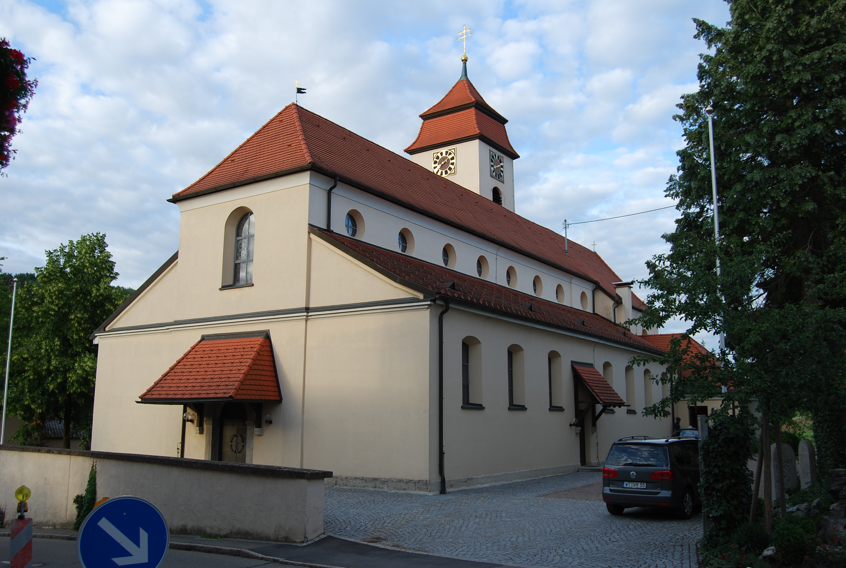 Kirche in Birndorf (um 1100 im romanischen Stil erbaut)